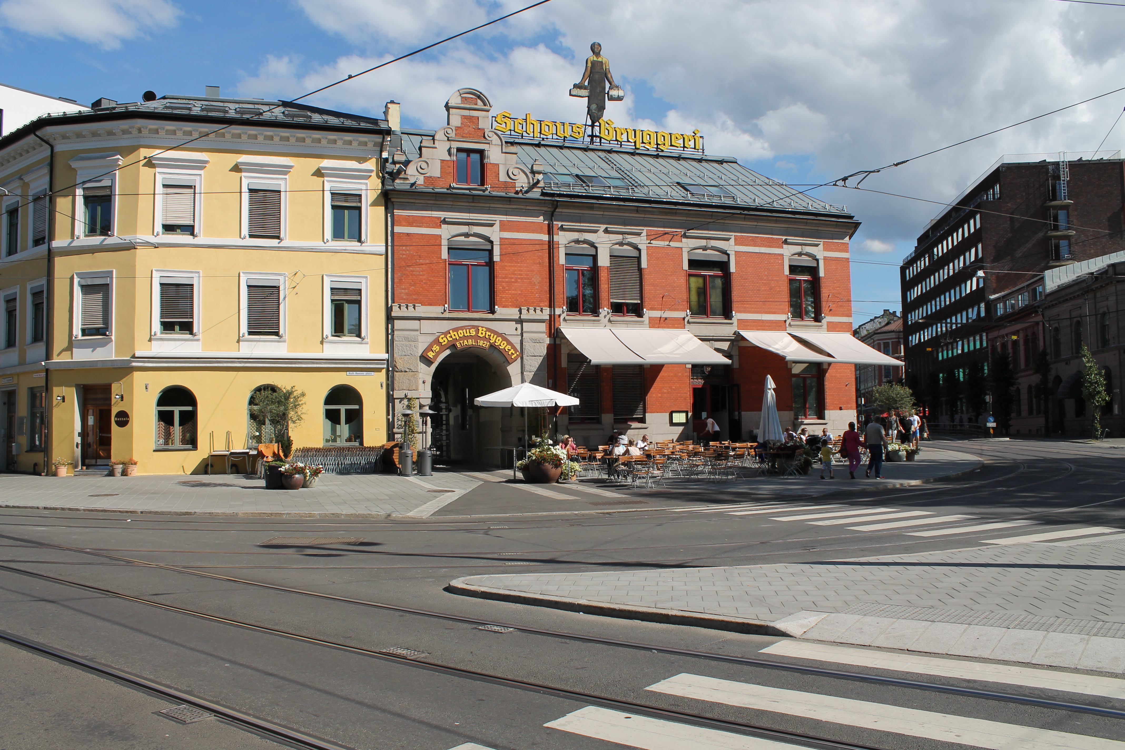 Ruth Reeses plass i Oslo. Template:Byline